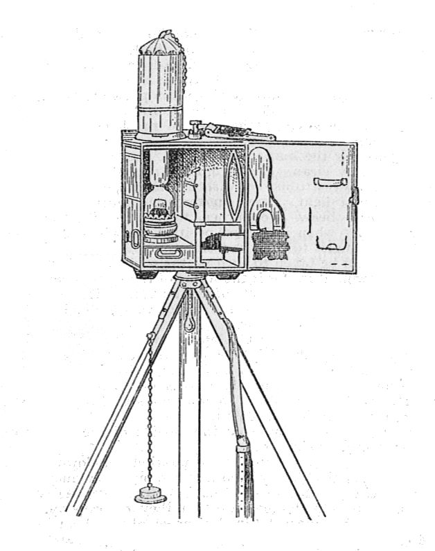 Begbie signalling oil lamp (Signalling, 1918).jpg